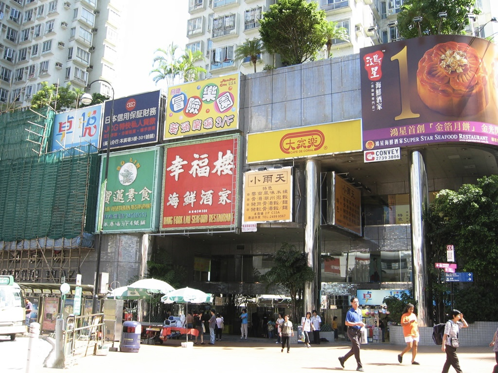 Kwai Chung Plaza